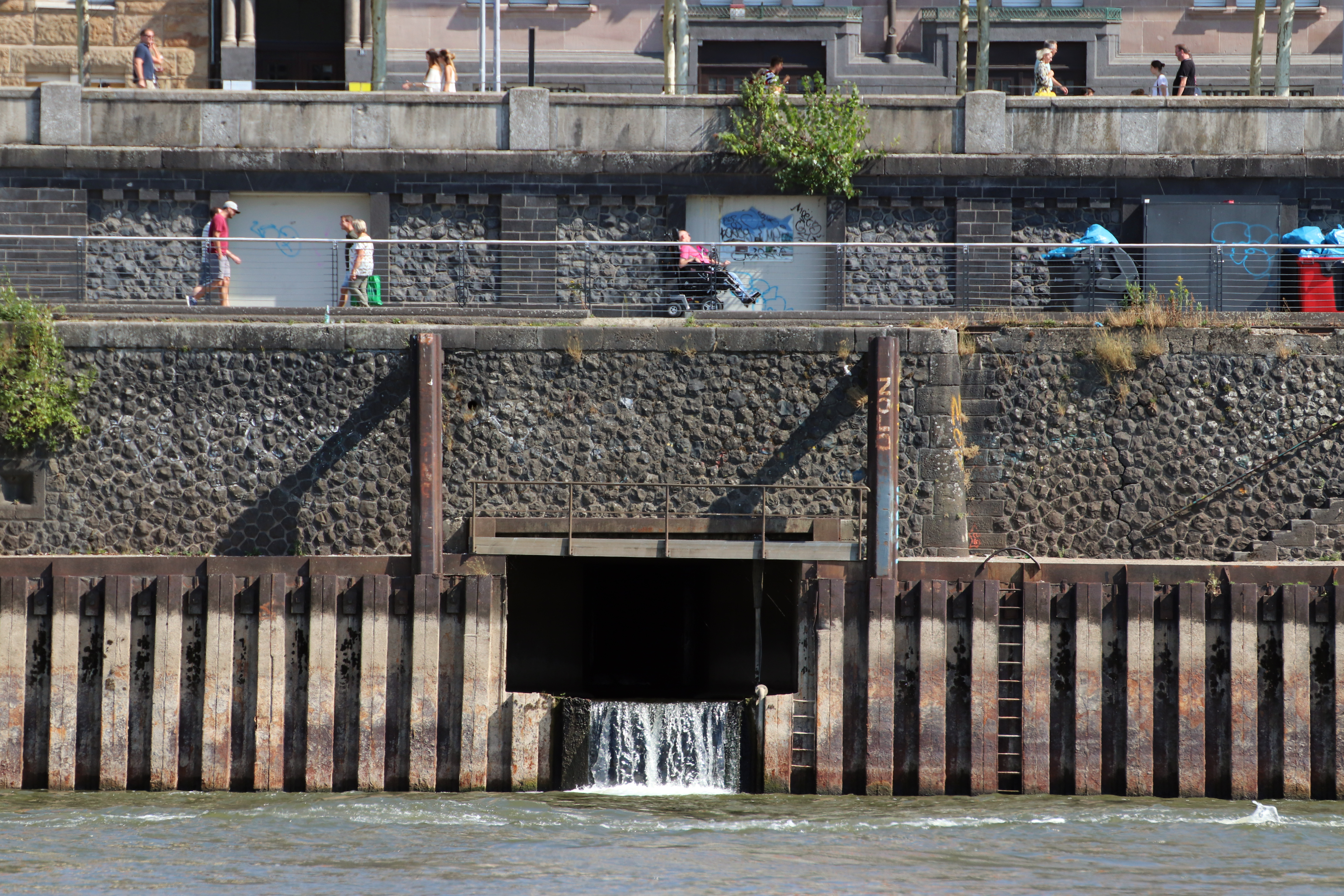 Mündung der südlichen Düssel unterhalb der Rheinuferpromenade in Düsseldorf